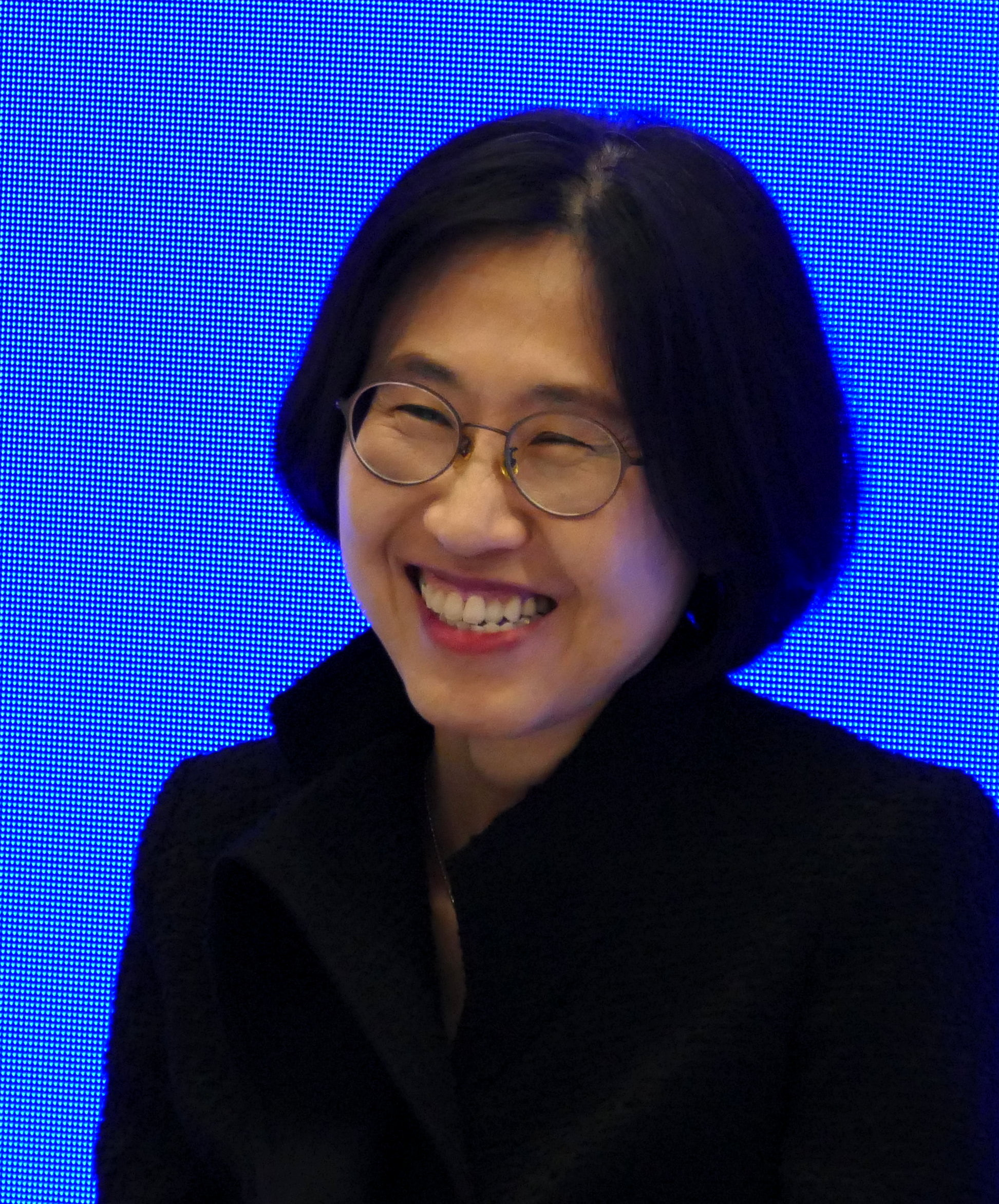 Jin Eun-young på Bokmässan i Göteborg 2019.